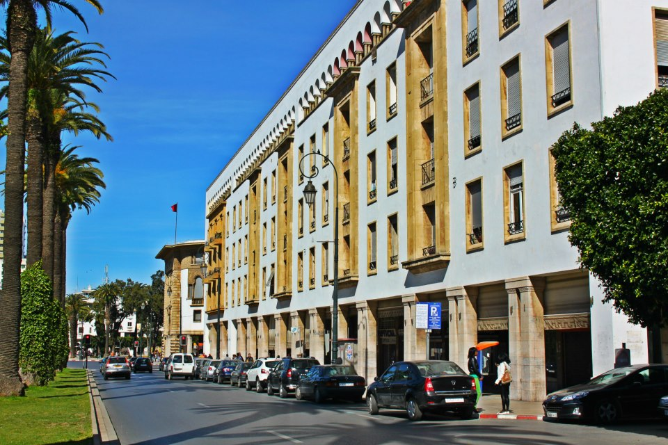 Mohamed V